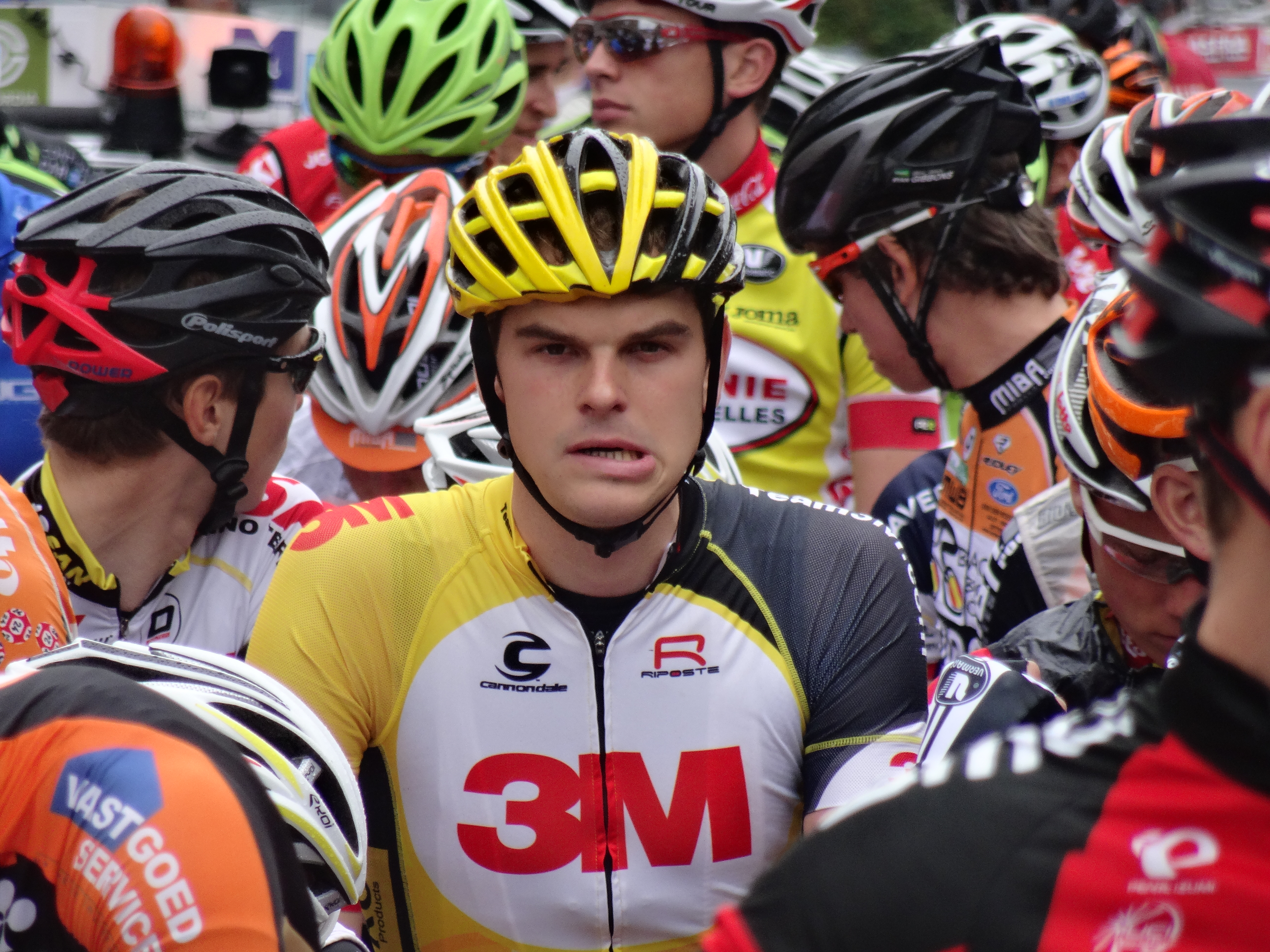 Reportage photographique réalisé le samedi 5 juillet à l'occasion du départ et de l'arrivée du Circuit Het Nieuwsblad espoirs 2014 à Grotenberge (Zottegem), Belgique.